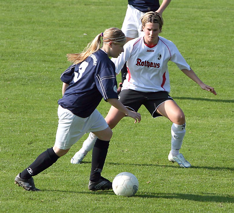 Nicole Söder im Zweikampf mit Nathalie Bock beim Spiel FFC Brauweiler Pulheim vs. SC Freiburg am 15.10.2006 (Endstand 0:2)